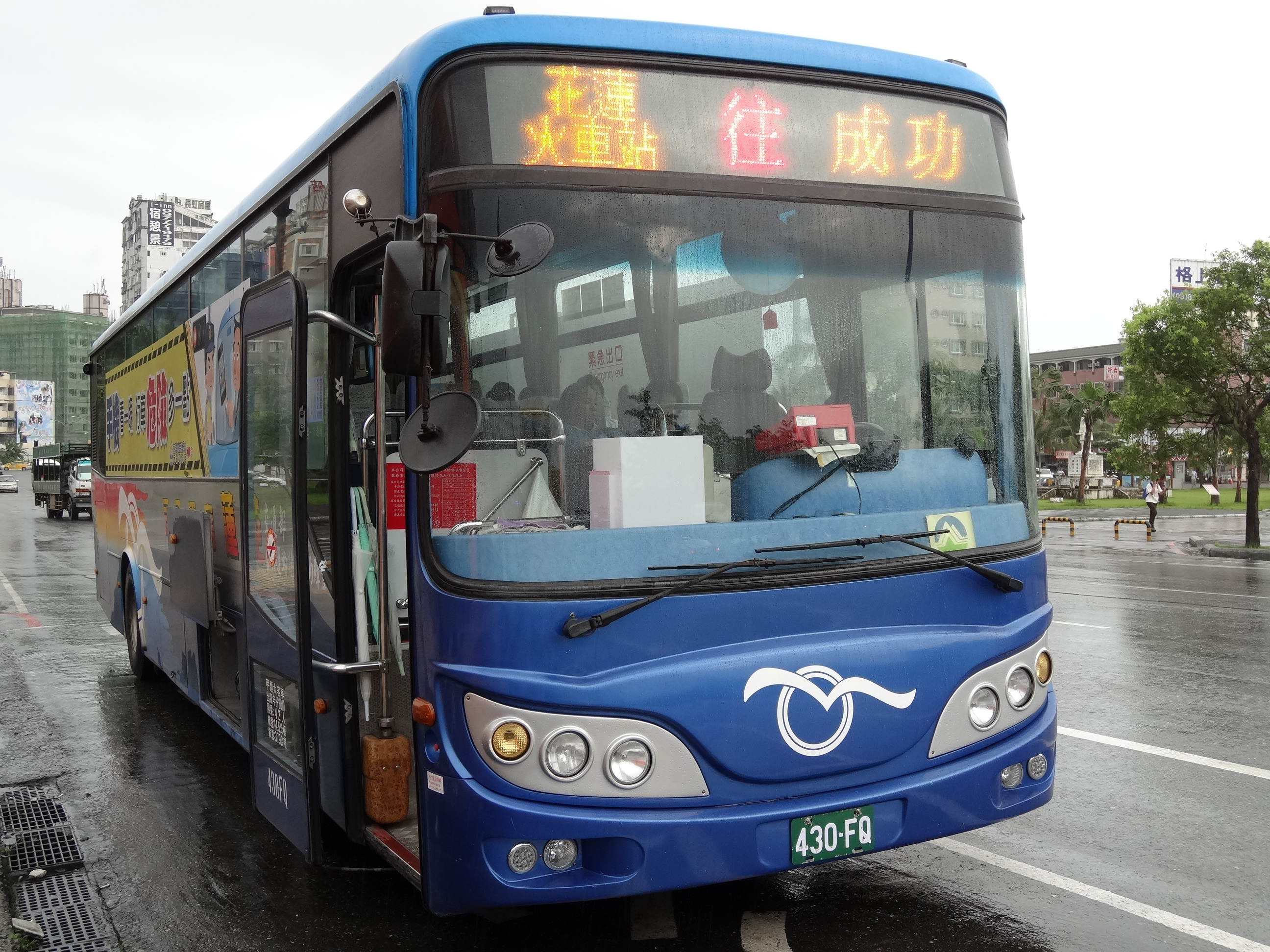 花蓮客運420-FQ，105花蓮火車站→七星潭